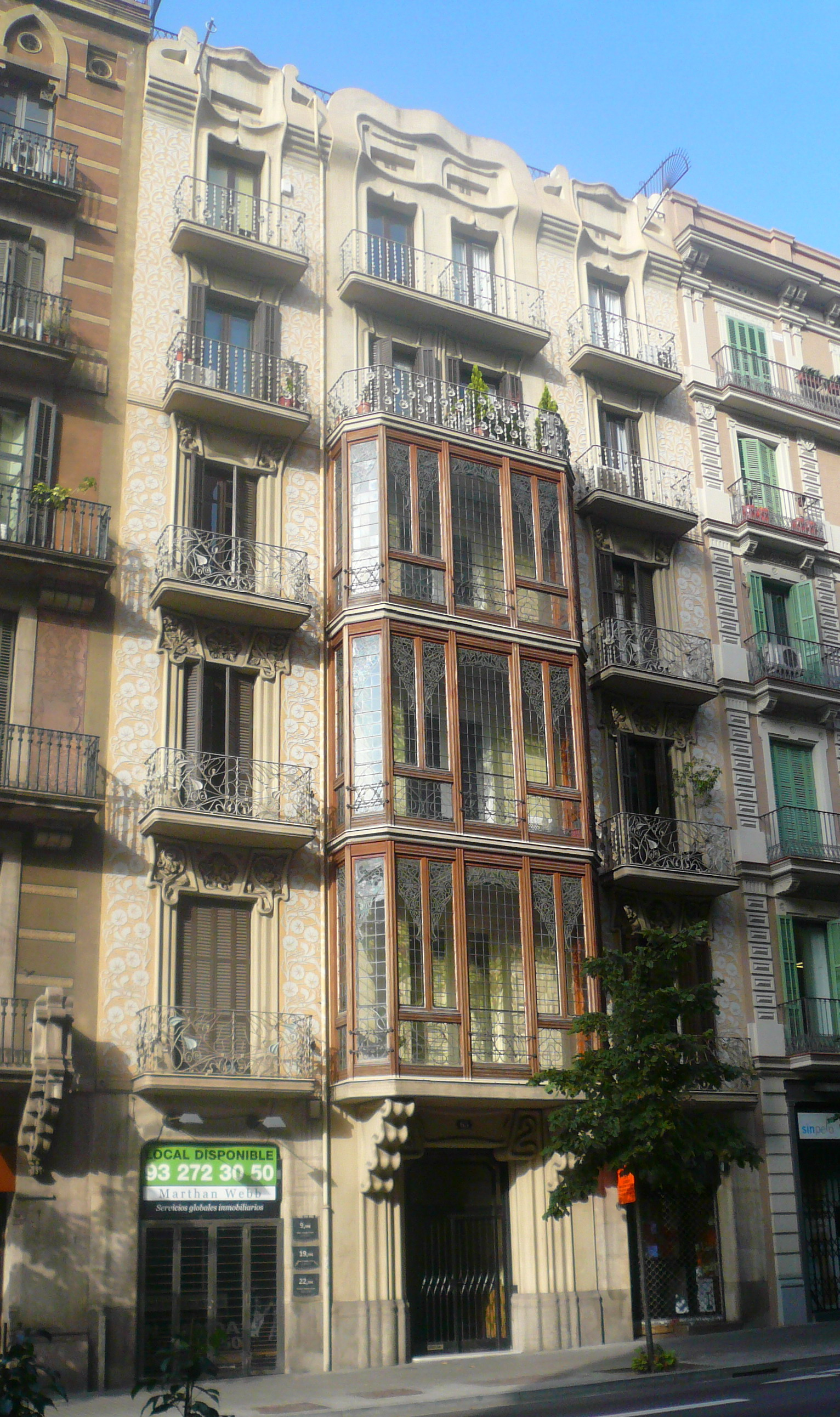 Casa Granell (Barcelona)